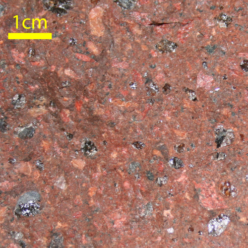 Rabakiviformatsiooni (1,6 Ga) kvartsporfüür (paleotüüpne rüoliit) Ahvenamaalt. Afaniitses põhimassis K-päevakivi ning kvartsi fenokristallid.